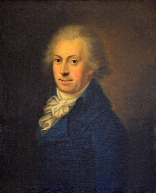 Anton Zeller: Porträt Wilhelm August Rudloff (1795) im Universitätsarchiv Rostock.